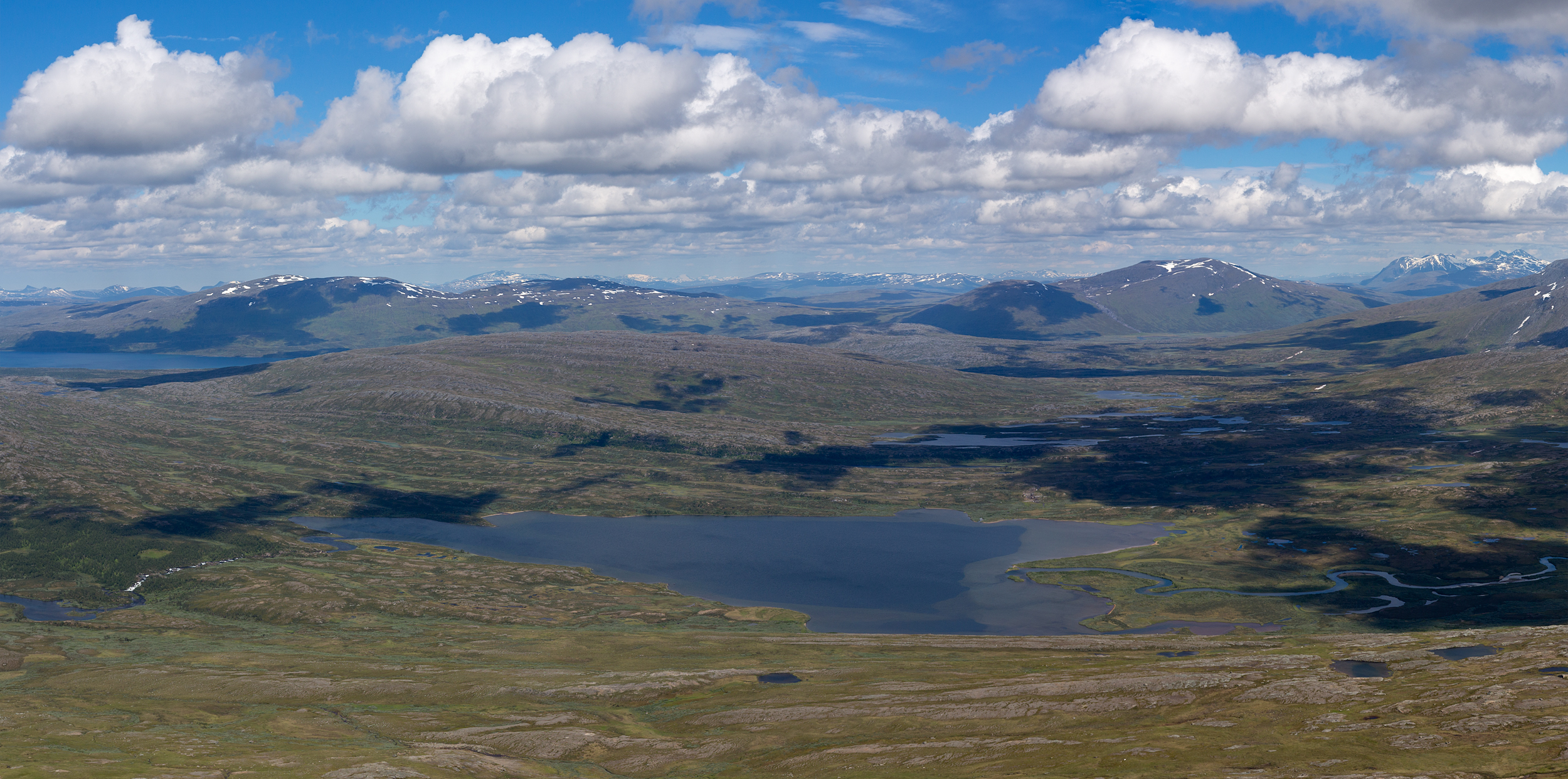 Gieddávrre - vy från 1356 på västra Gierggevárre.